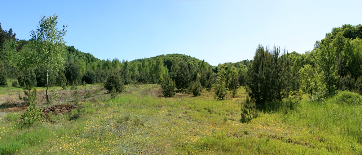 В Яворовском районе Львовской области, на территории Яворовского военного полигона